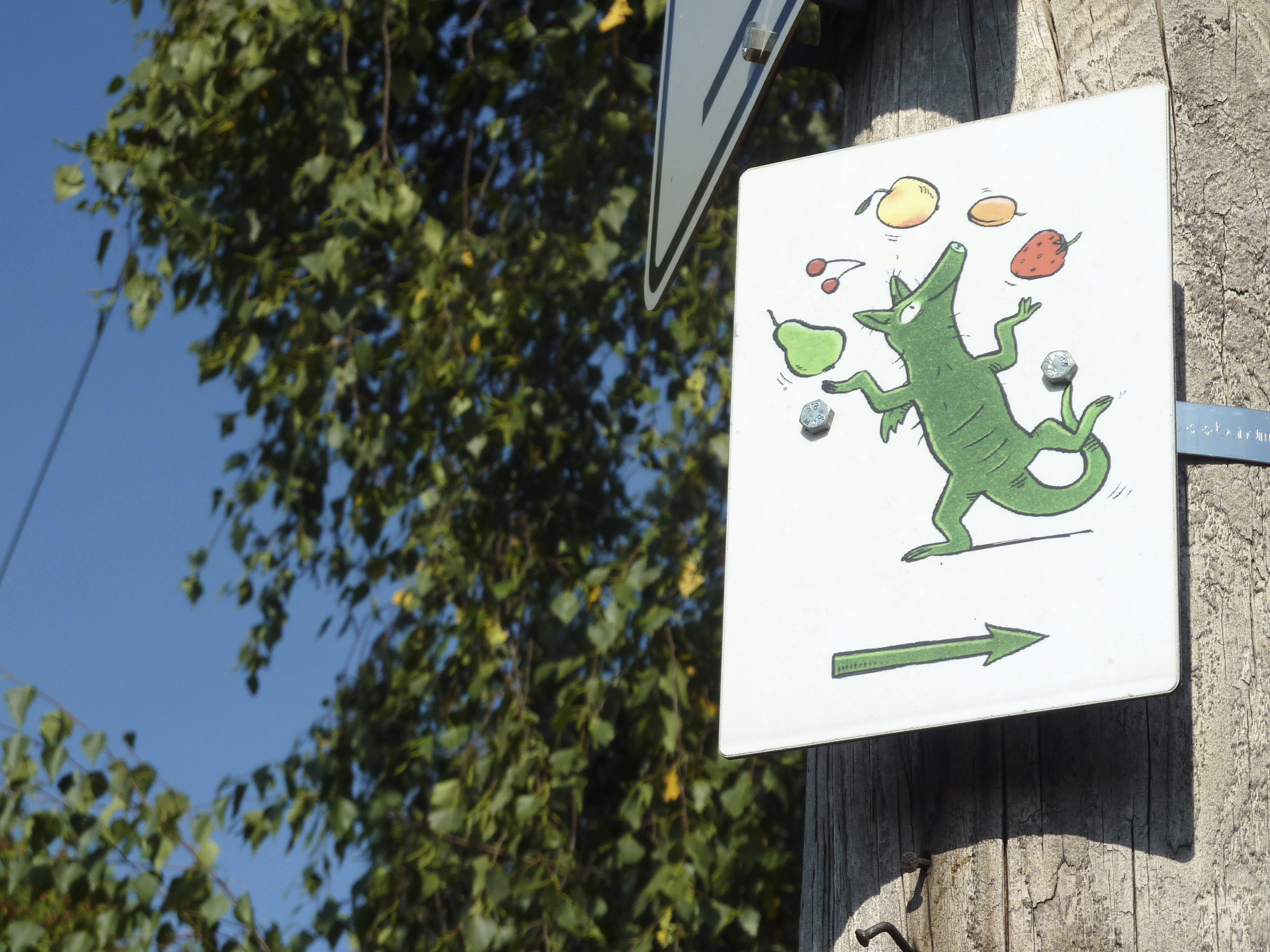 Frankfurt am Main, Stadtteil Sossenheim: Sossenheimer Unterfeld ist die Sammelbezeichnung für die landwirtschaftlich genutzten Felder und Wiesen zwischen dem südlichen Ortsrand Sossenheims und dem rechten Ufer des Flusses Nidda. Das Foto zeigt einen Wegweiser des Sossenheimer Obstpfades – ein Lehrpfad durch das Unterfeld mit dem Schwerpunkt Obstanbau. Auf dem Schild abgebildet ist eine Darstellung der Sympathiefigur des Frankfurter Grüngürtels, das Grüngürteltier. Das mit Obst jonglierende Tier ist das Symbol des Lehrpfades. Zeichnung von Philip Waechter